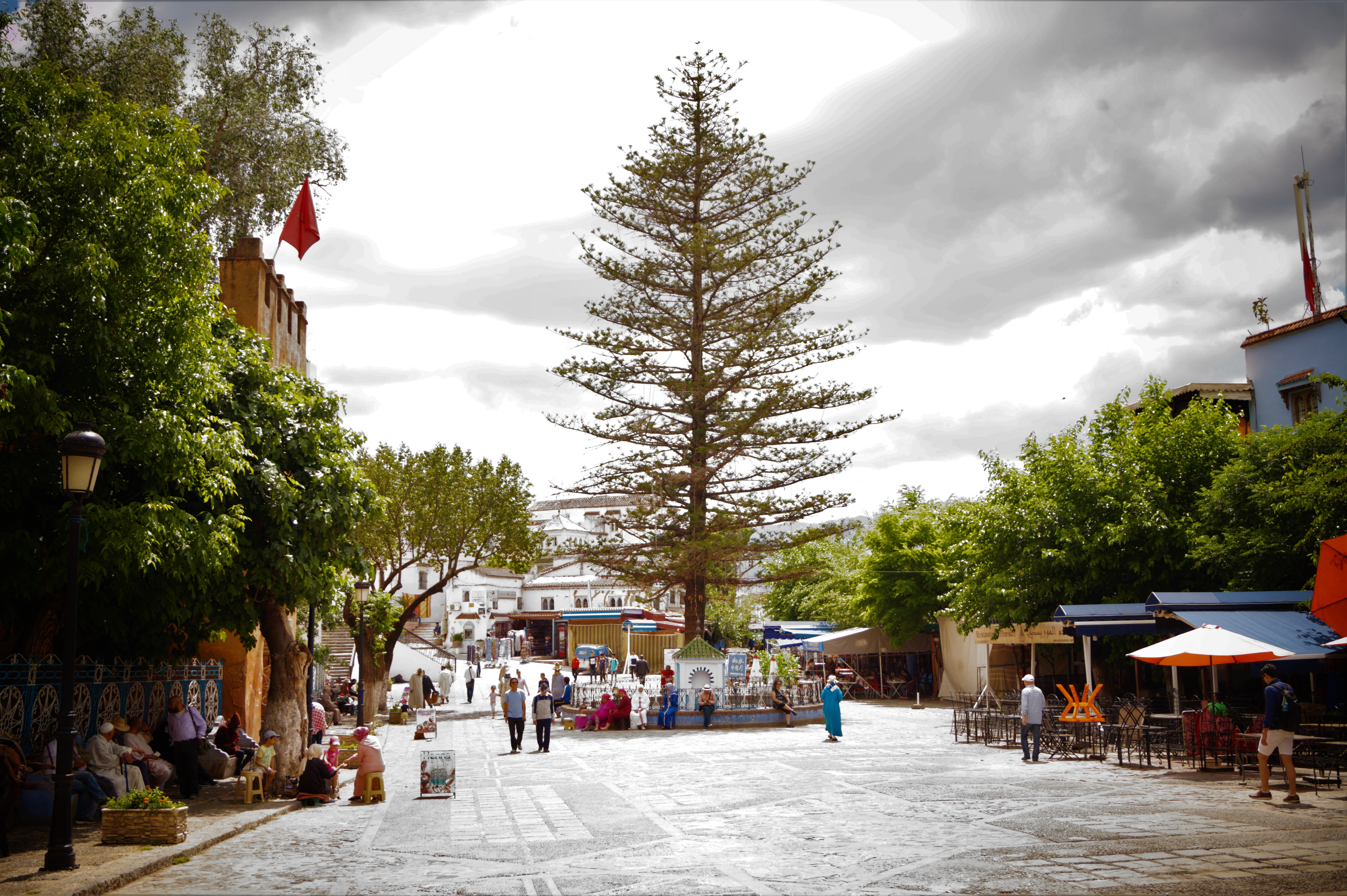 Plaza Uta Hamam o Uta El Hammam, en la ciudad de Chefchauen o Chauen, al norte de Marruecos y al pie de la montaña Rif. Vista del árbol que se ubica al centro del lugar.